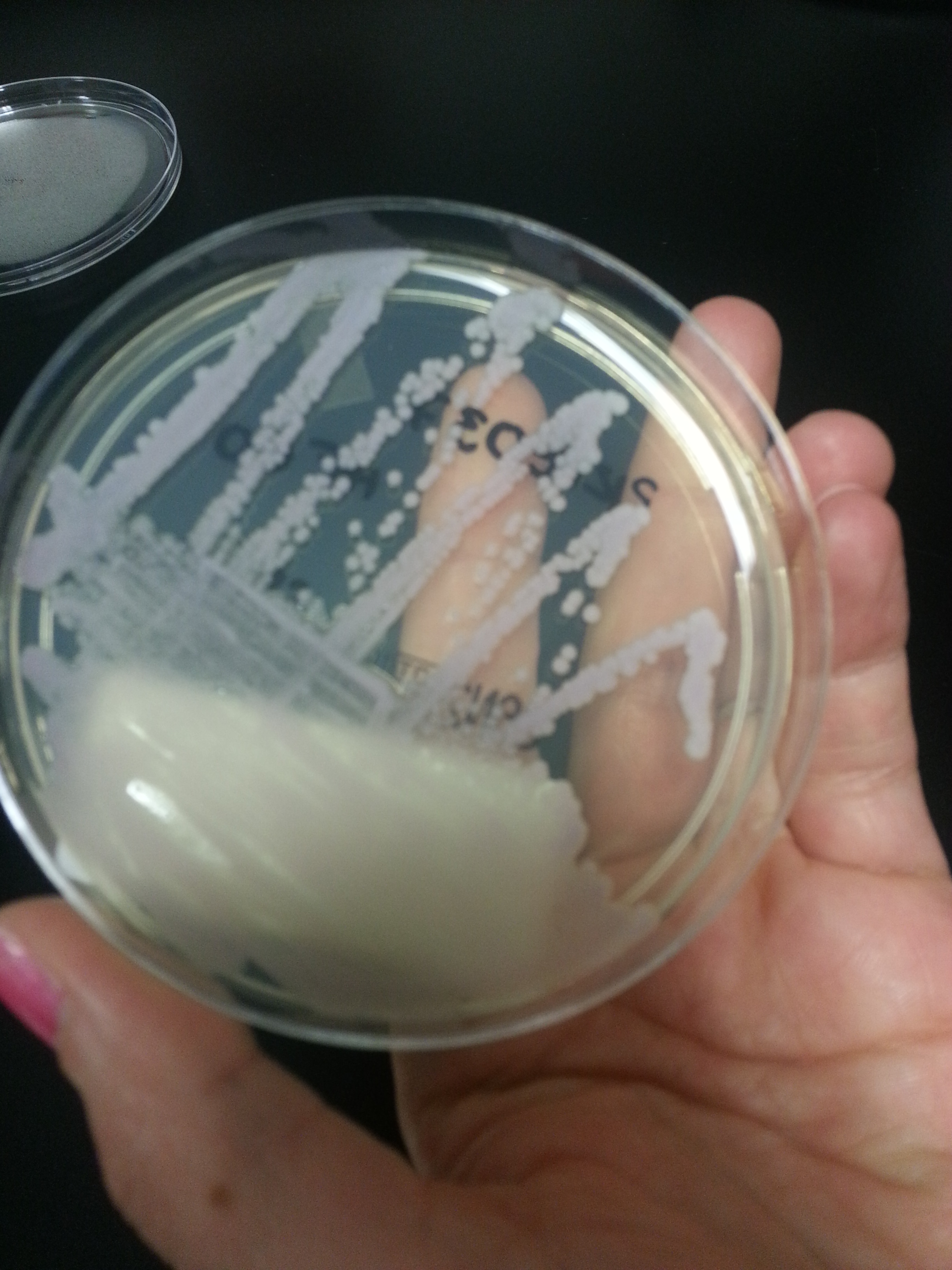 culture from microbology lab hospital Lisbon